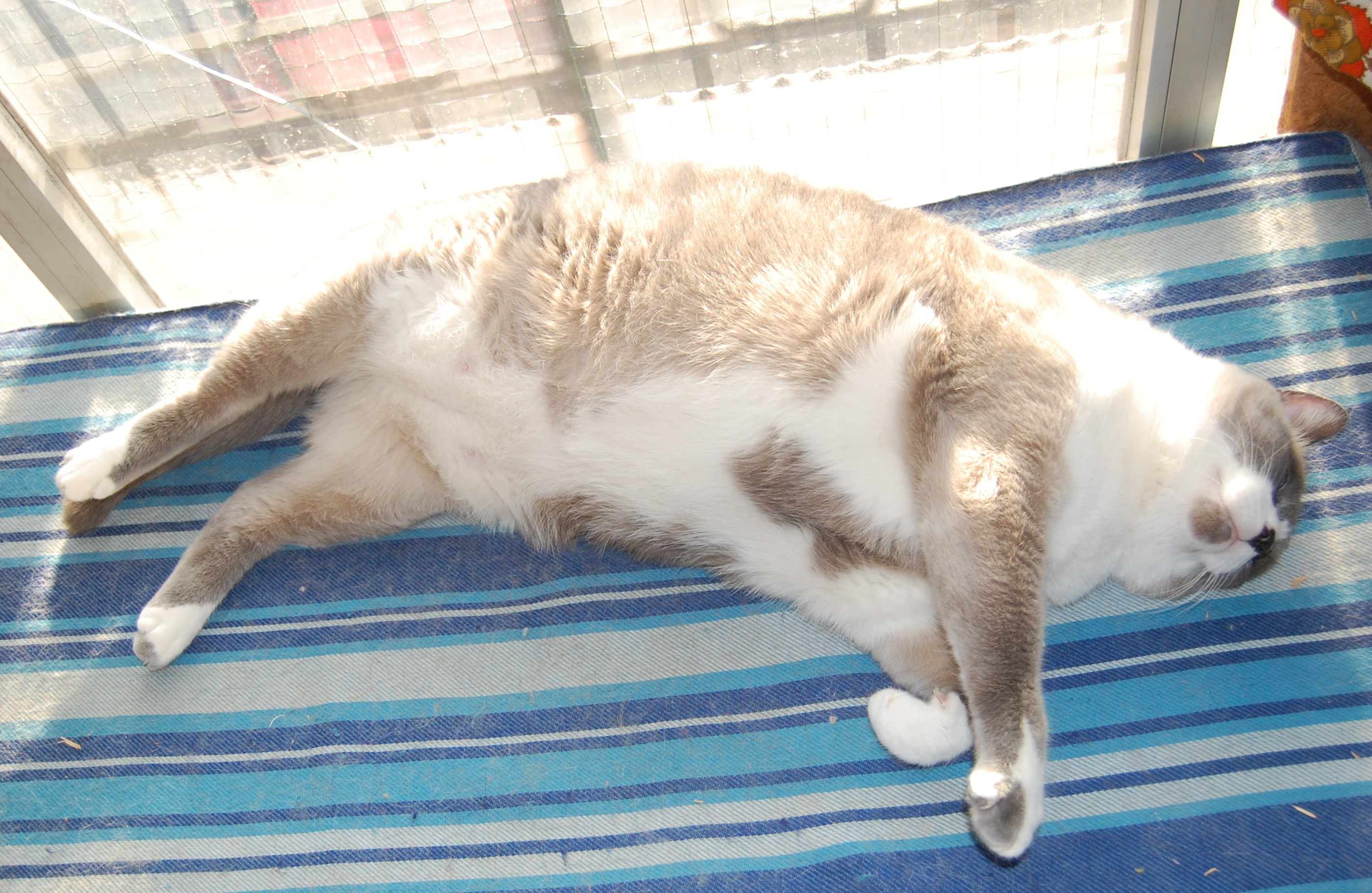 Gato gordo durmiendo durante el día